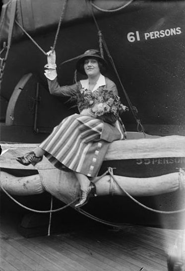 Erika Morini (1906- 1995), Austrian violinist